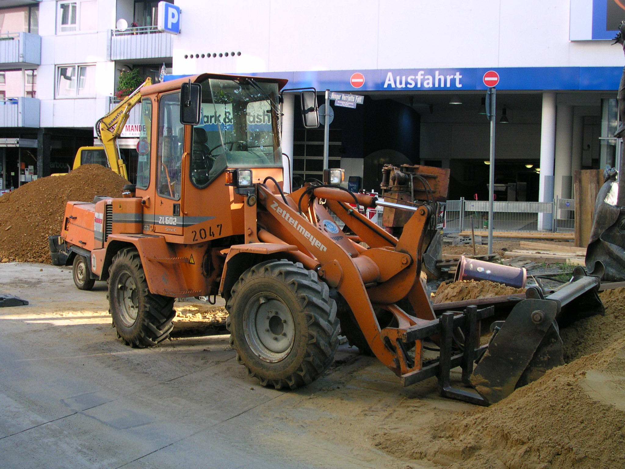 Zettelmeyer-Radlader an einer Baustelle in Aachen